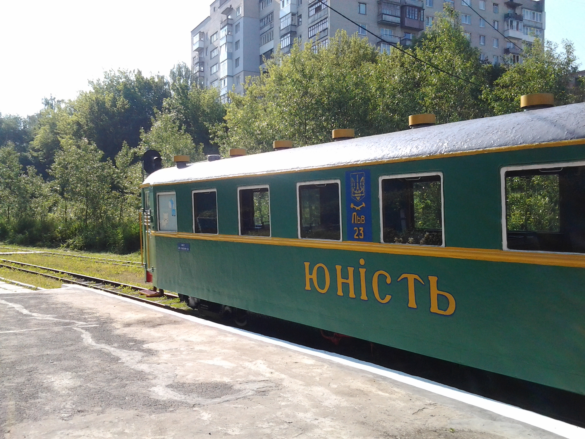 Луцька дитяча залізниця. Потяг "Юність". 2016 рік